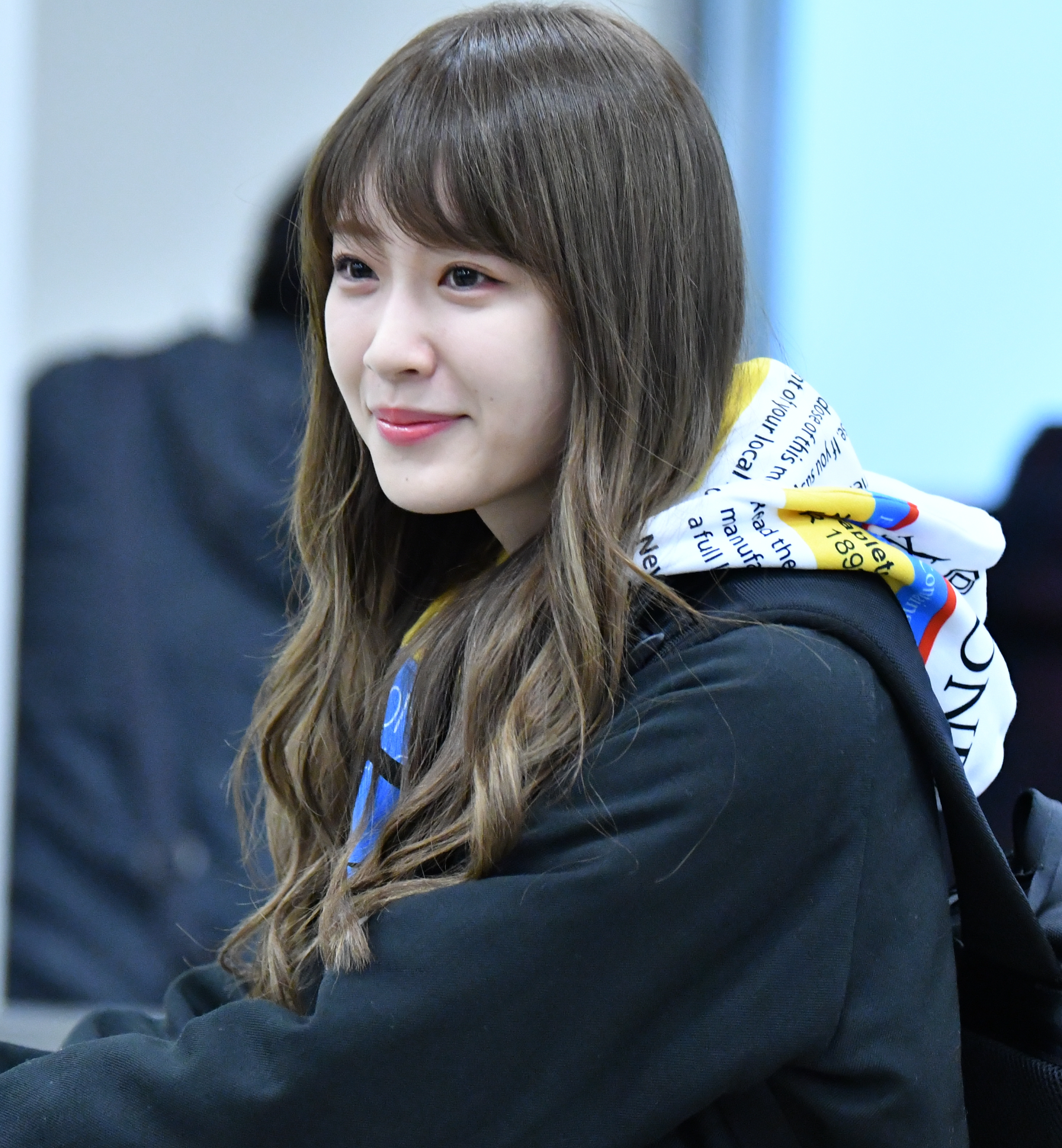 乃木坂46成員在台北國際松山機場。